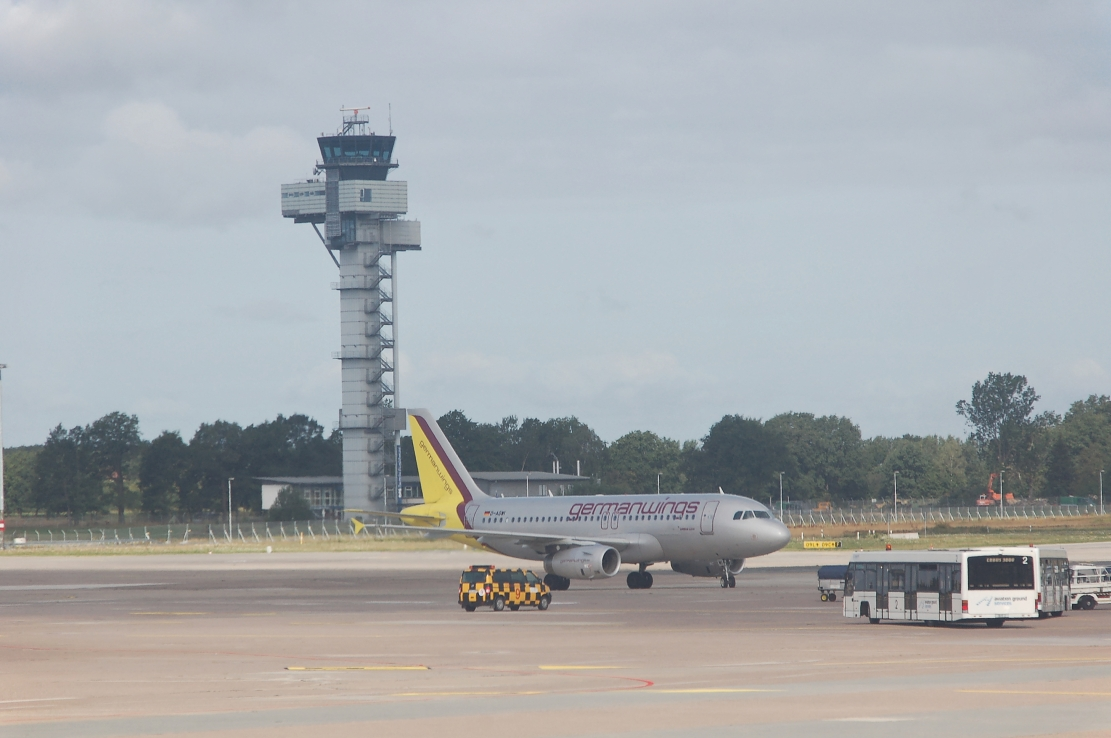 Hanover Langenhagen International Airport